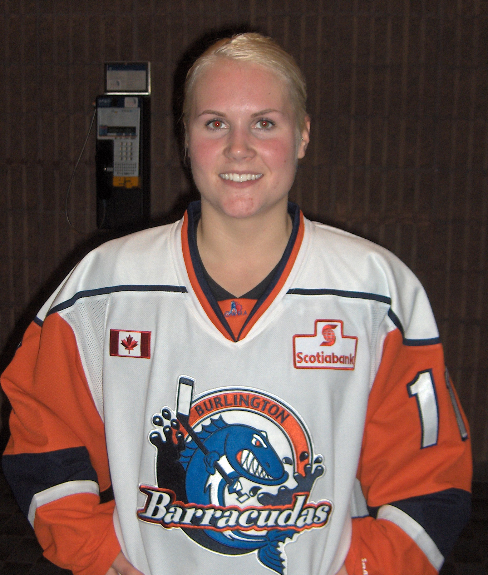 Joueuse du Barracudas de Burlington